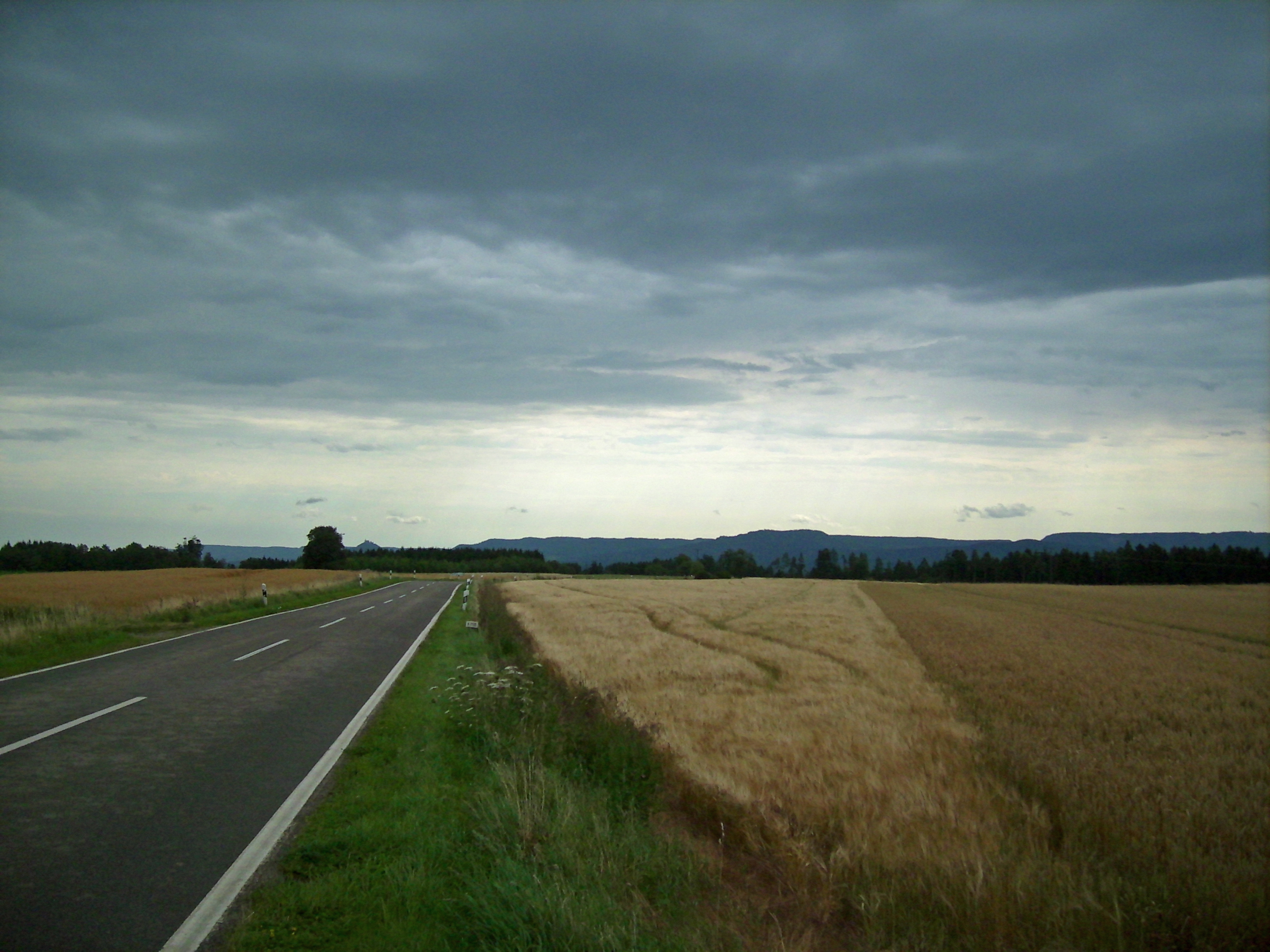 Kastell Geislingen/Häsenbühl Gelände beim Kastell Häsenbühl